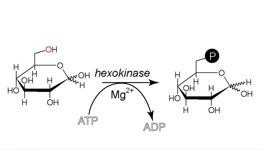 Synthèse du glucose-6-phosphat: 1ère étape de la glycolyse. Création personelle. --- Pixeltoo 25 août 2005 à 12:38 (CEST)